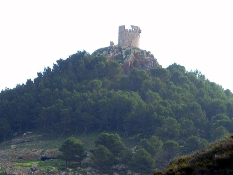 منظر لقلعة تازضا فوق جبل كوروكو في اقليم الناظور